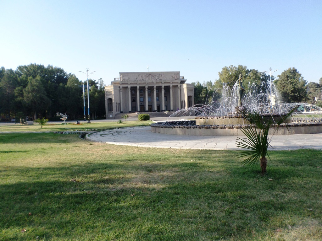 Площадь возле театра музыкалӣной комедии имени Камола Худжанди г. Худжанд Тоҷикӣ: Майдони назди театри мусиқӣ мазҳакавии ба номи Камоли Хуҷандӣ ш. Хуҷанд